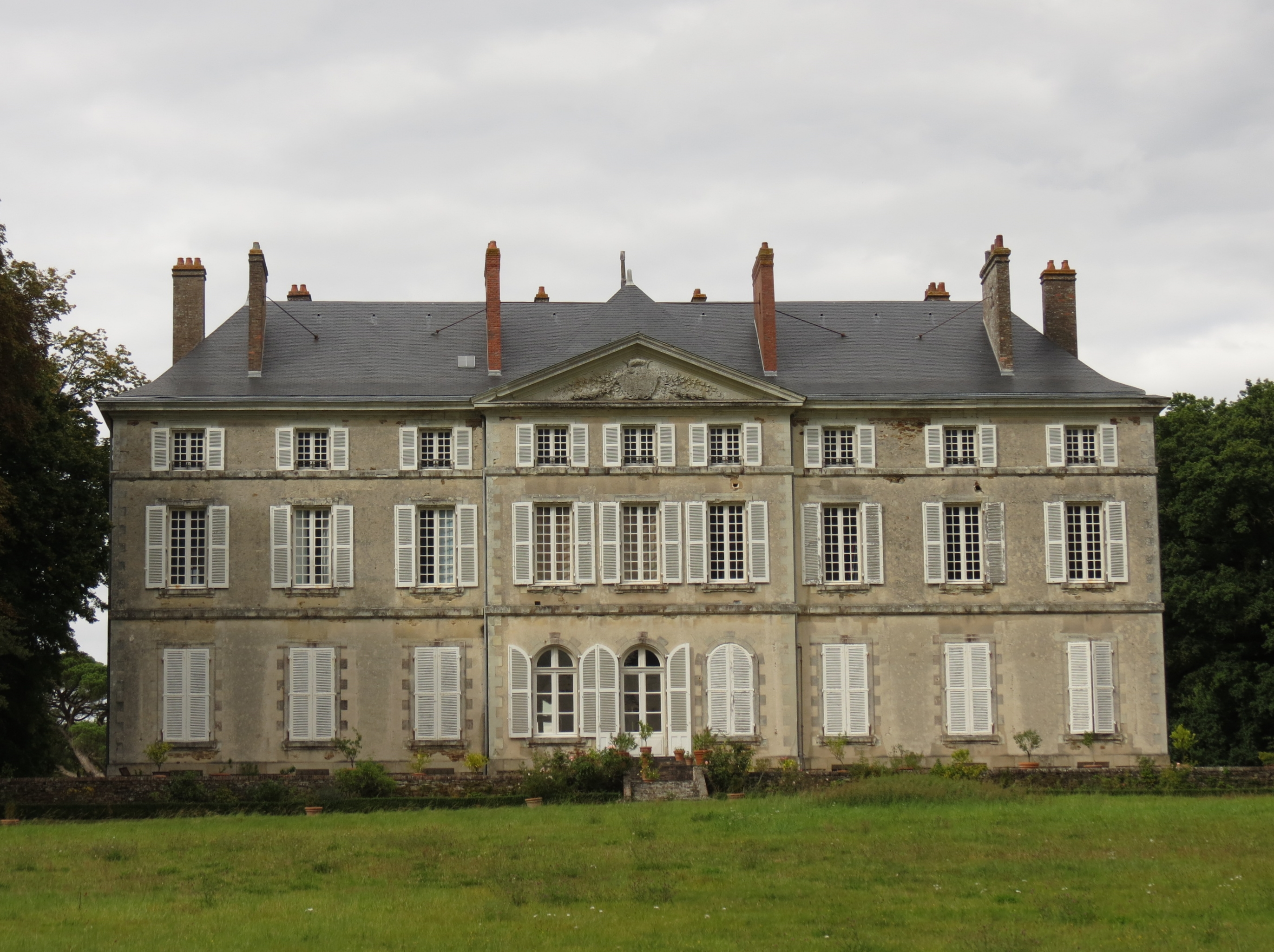 Noyant